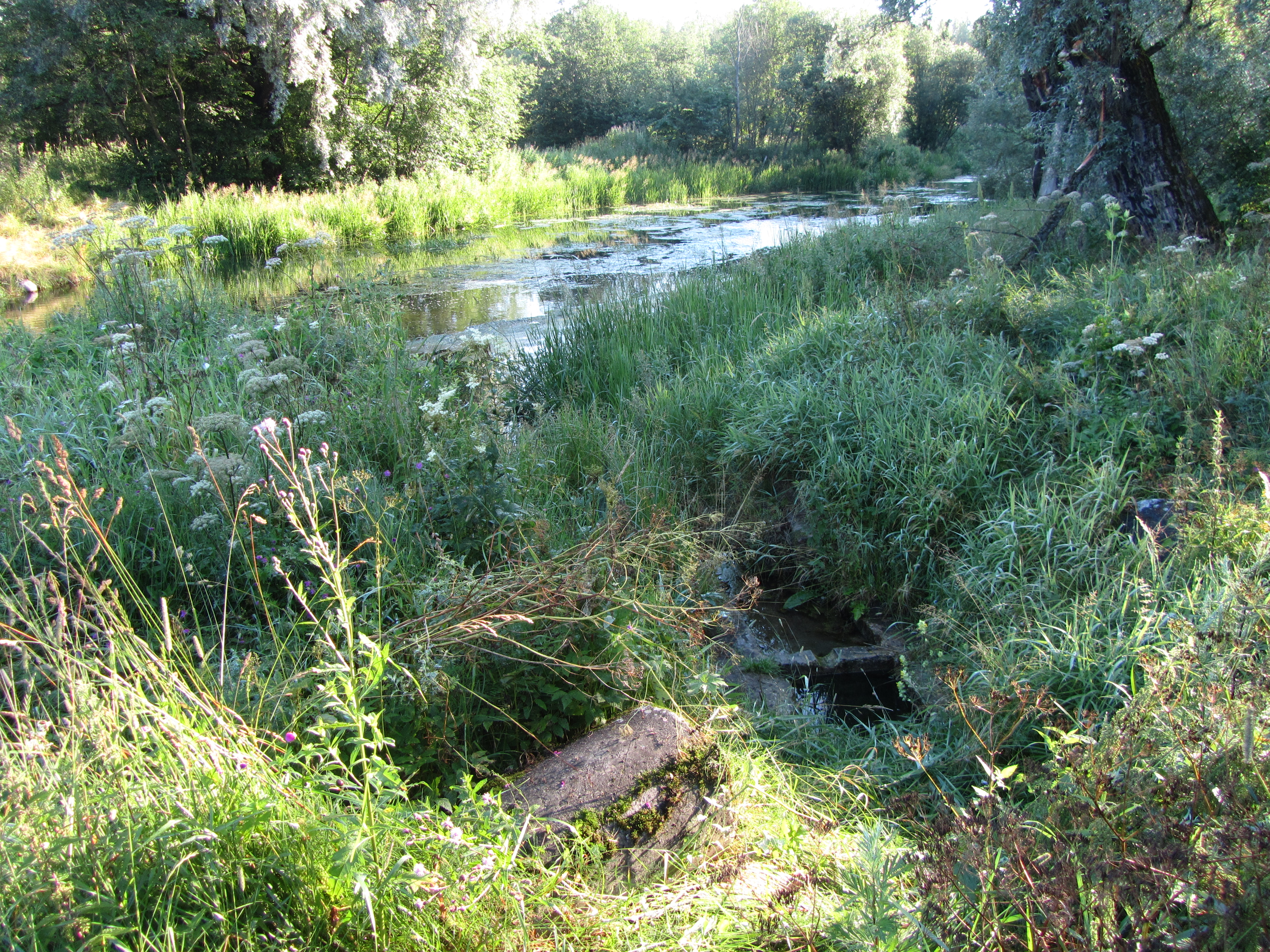 Оформление источника в парке Сильвия, 1797-1799 гг., архитектор Н. Львов